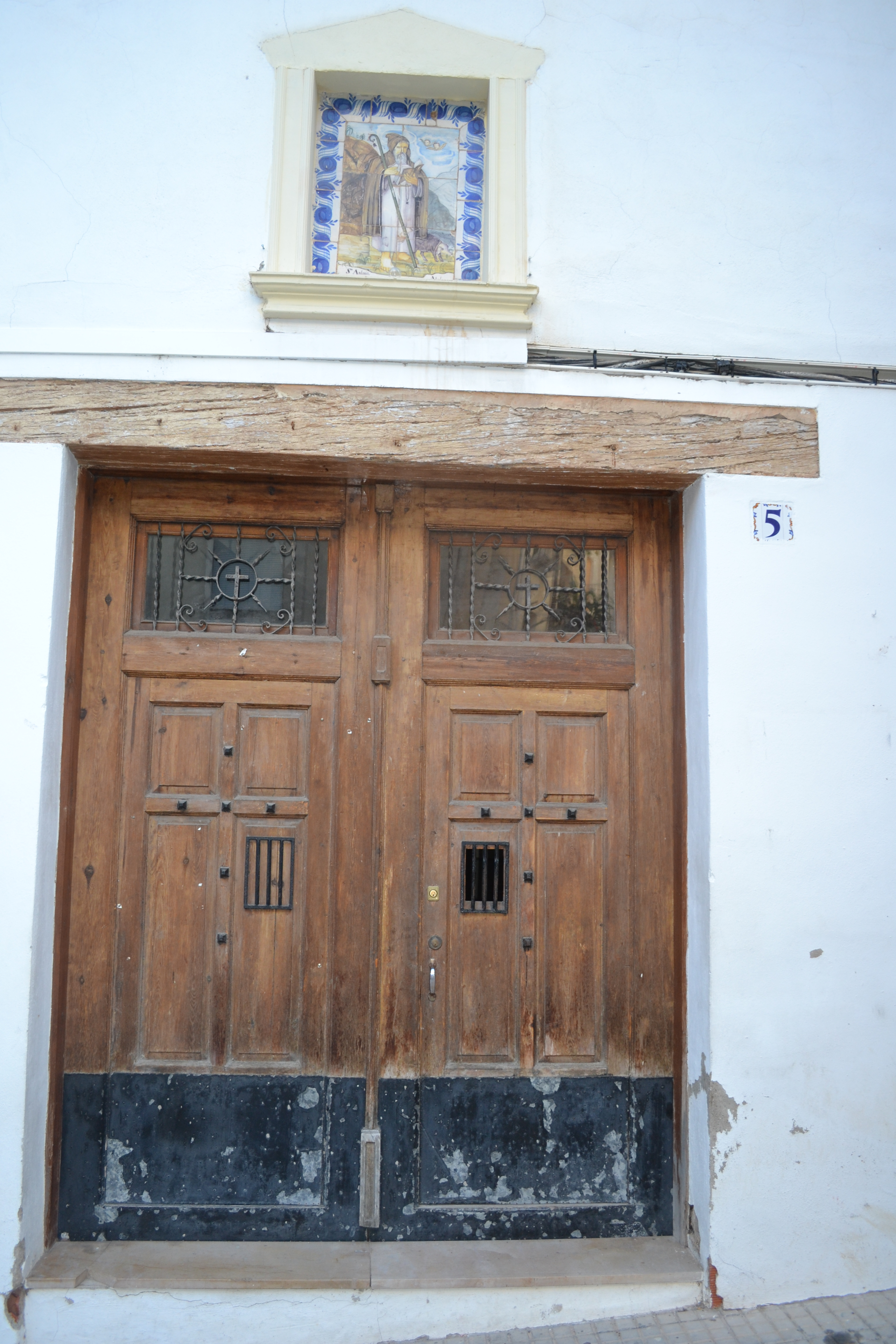 Puerta de la ermita de San Antonio Abad de Segorbe. Se halla en la calle Torre nº 5.